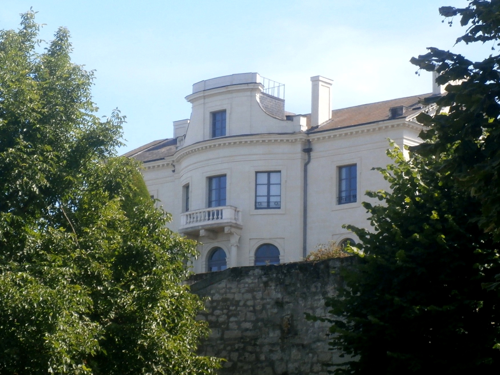 Façade nord (principale) du château Neuf